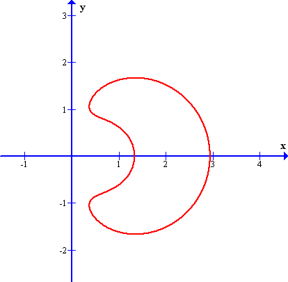 Owal Kartezjusza o parametrach: a = 1, b = 1, c = -1